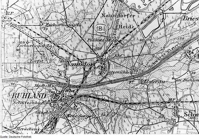 Original image description from the Deutsche Fotothek Ruhland-Naundorf. Karte, 1:100.000